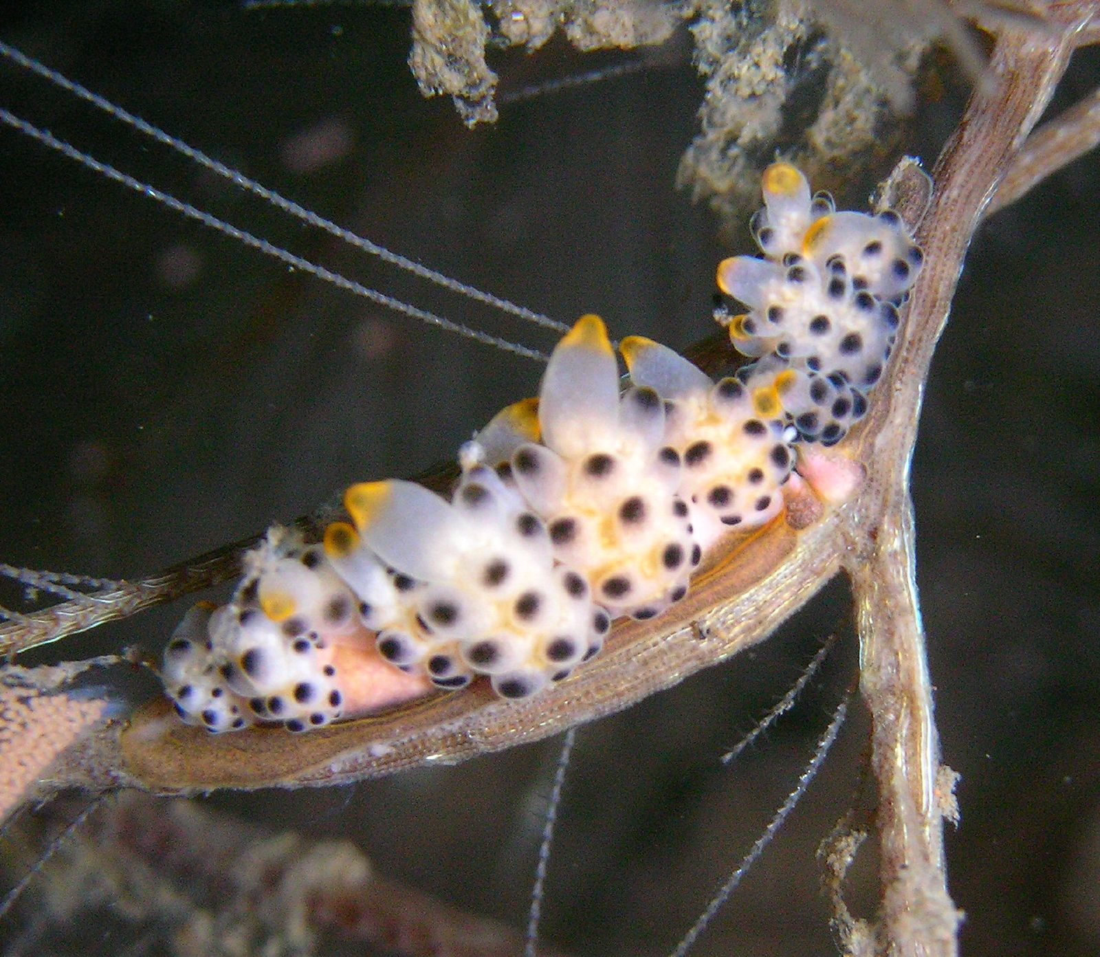 Doto bella Baba, 1938